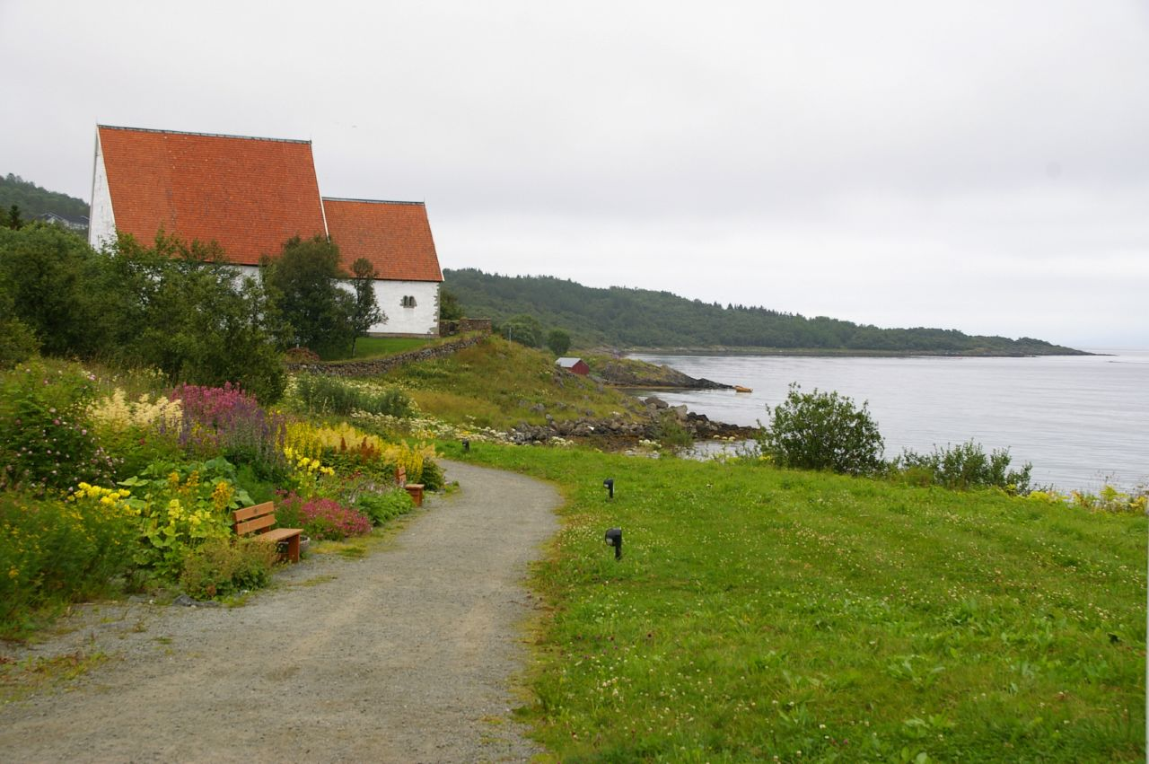 Trondenes kyrkje